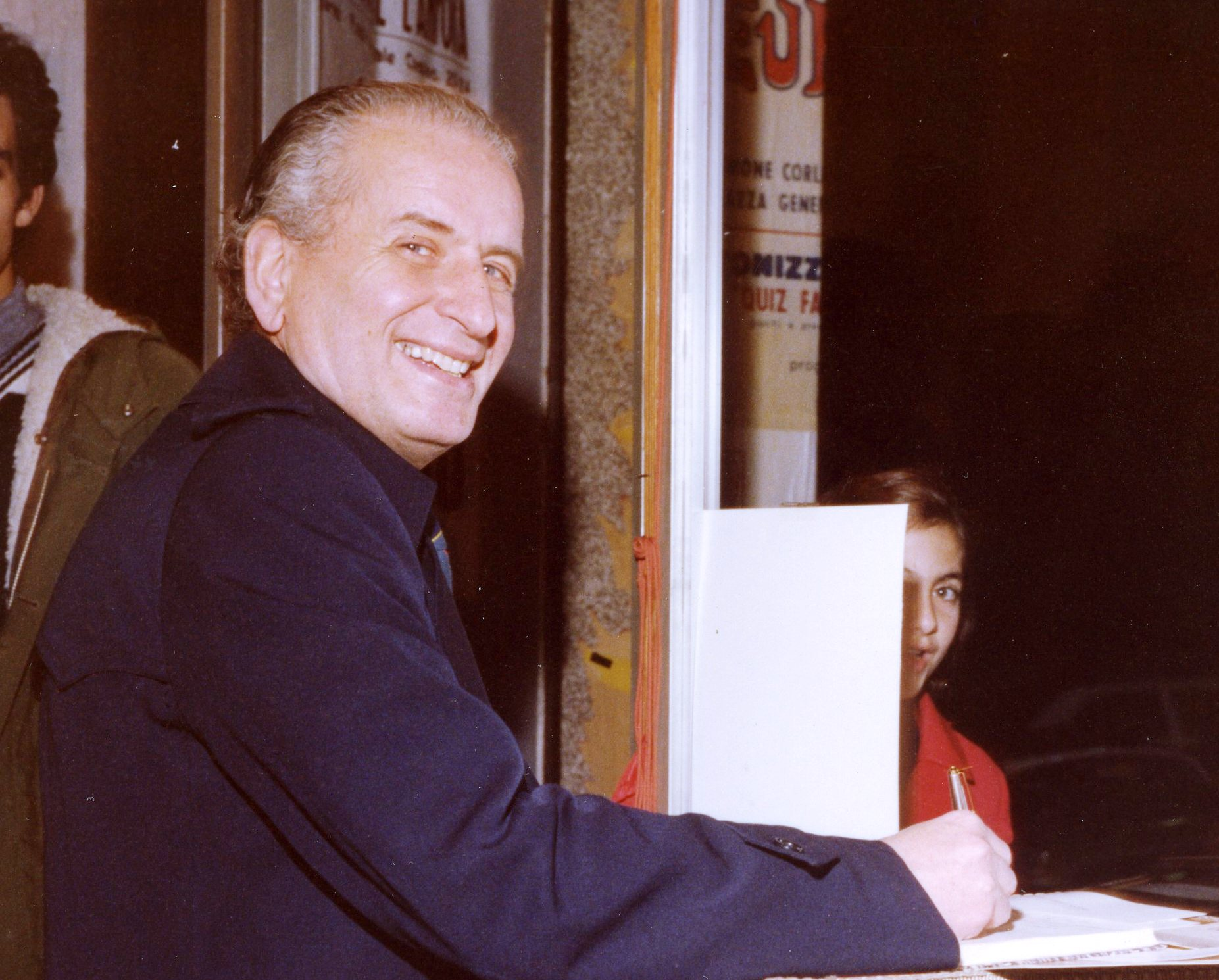 Palermo, Gennaio 1978